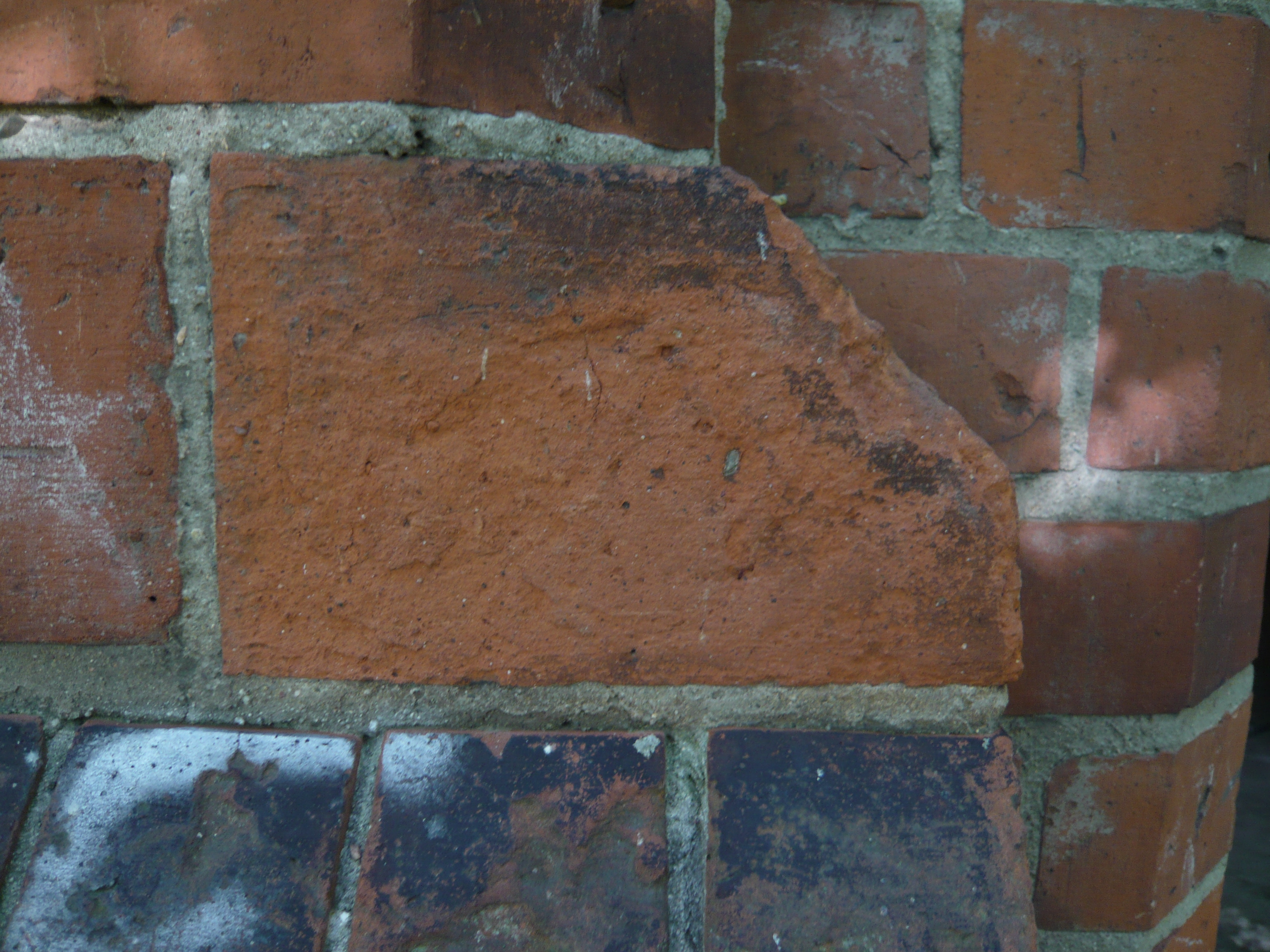 Bernau bei Berlin, Wasserturm: Ziegelformat